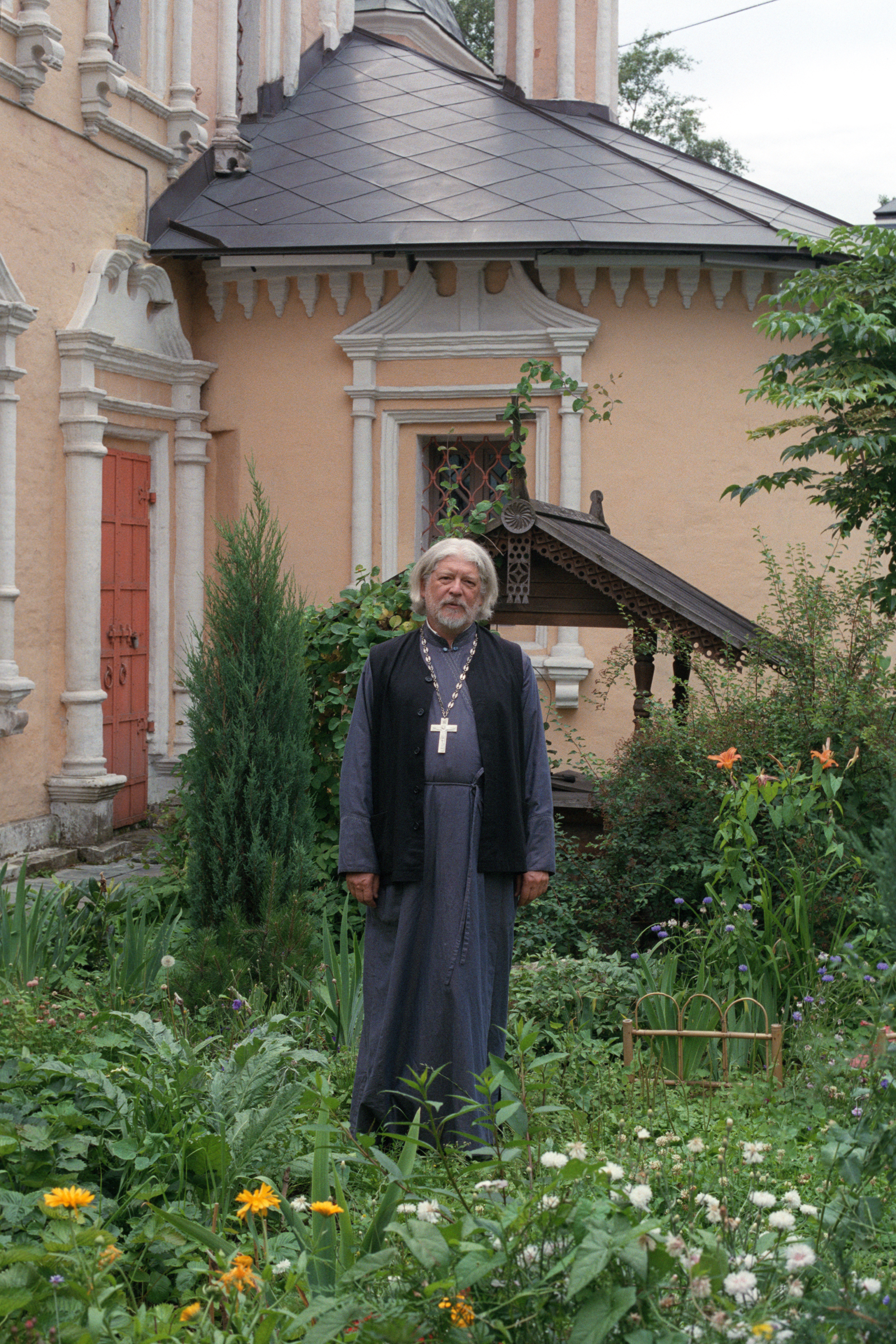 Протоиерей Алексей Уминский во дворе храма Живоначальной Троицы в Хохлах. 2017 год. Фотография: Андрей Носков